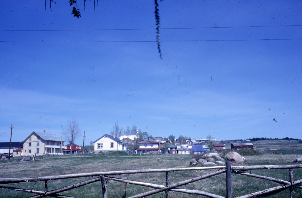 Diapositive couleur illustrant la municipalité Les Éboulements dans la région administrative de la Capitale-Nationale.